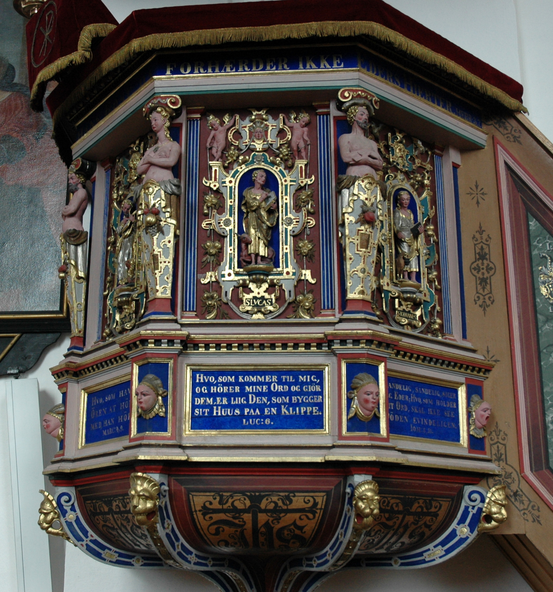 Slangerup Kirke Slangerup Kirke